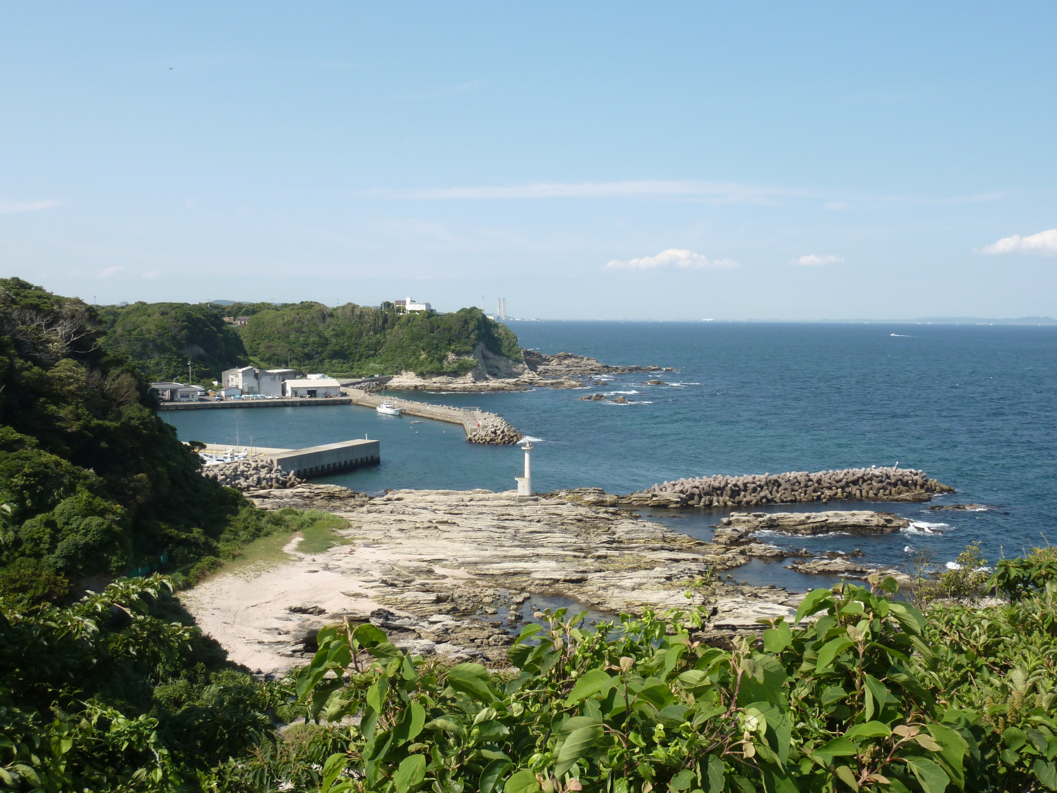 神奈川県三浦市 / 剱埼灯台脇より臨む間口漁港